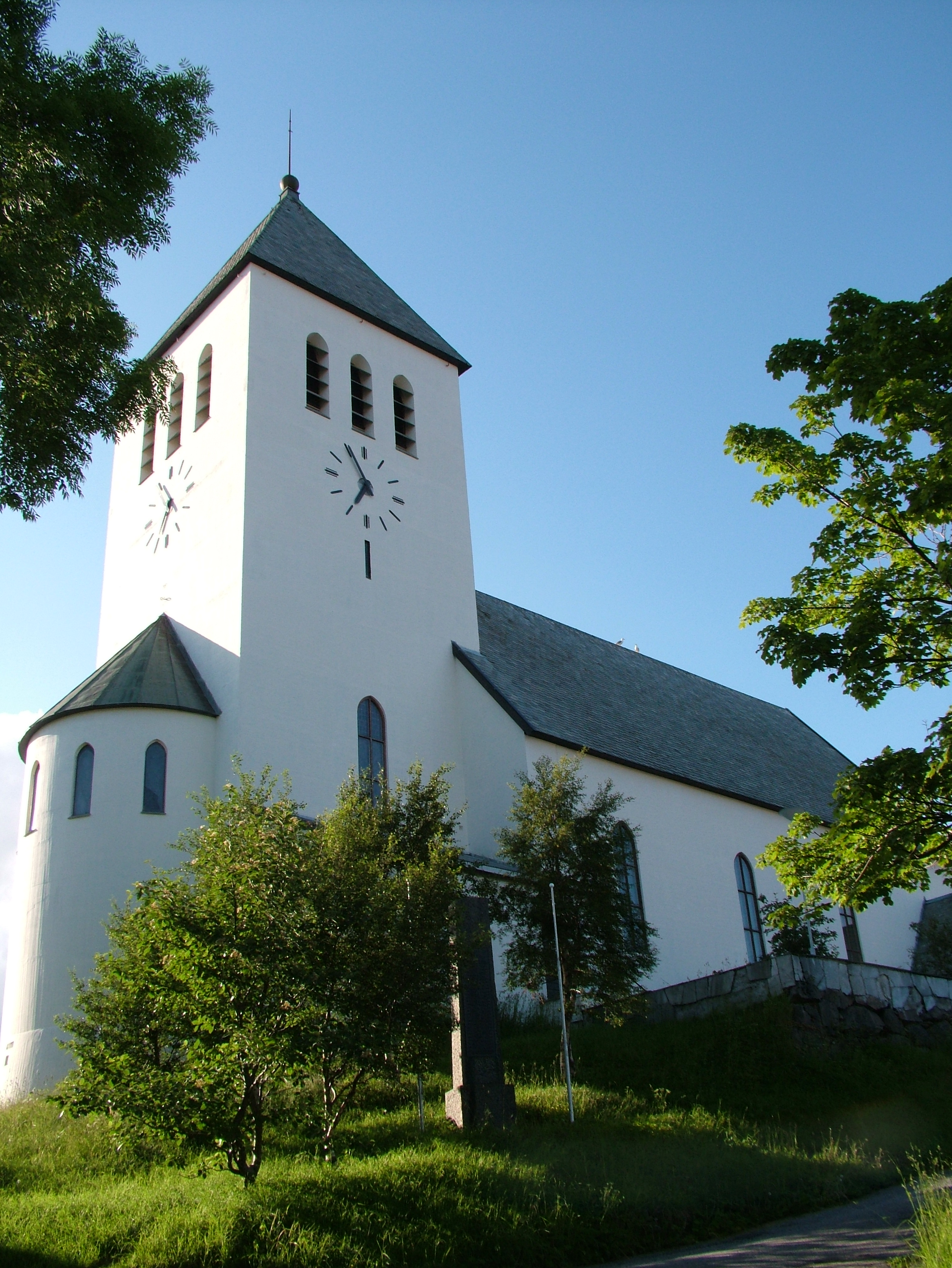 Svolvær kirke i Lofoten, Norway